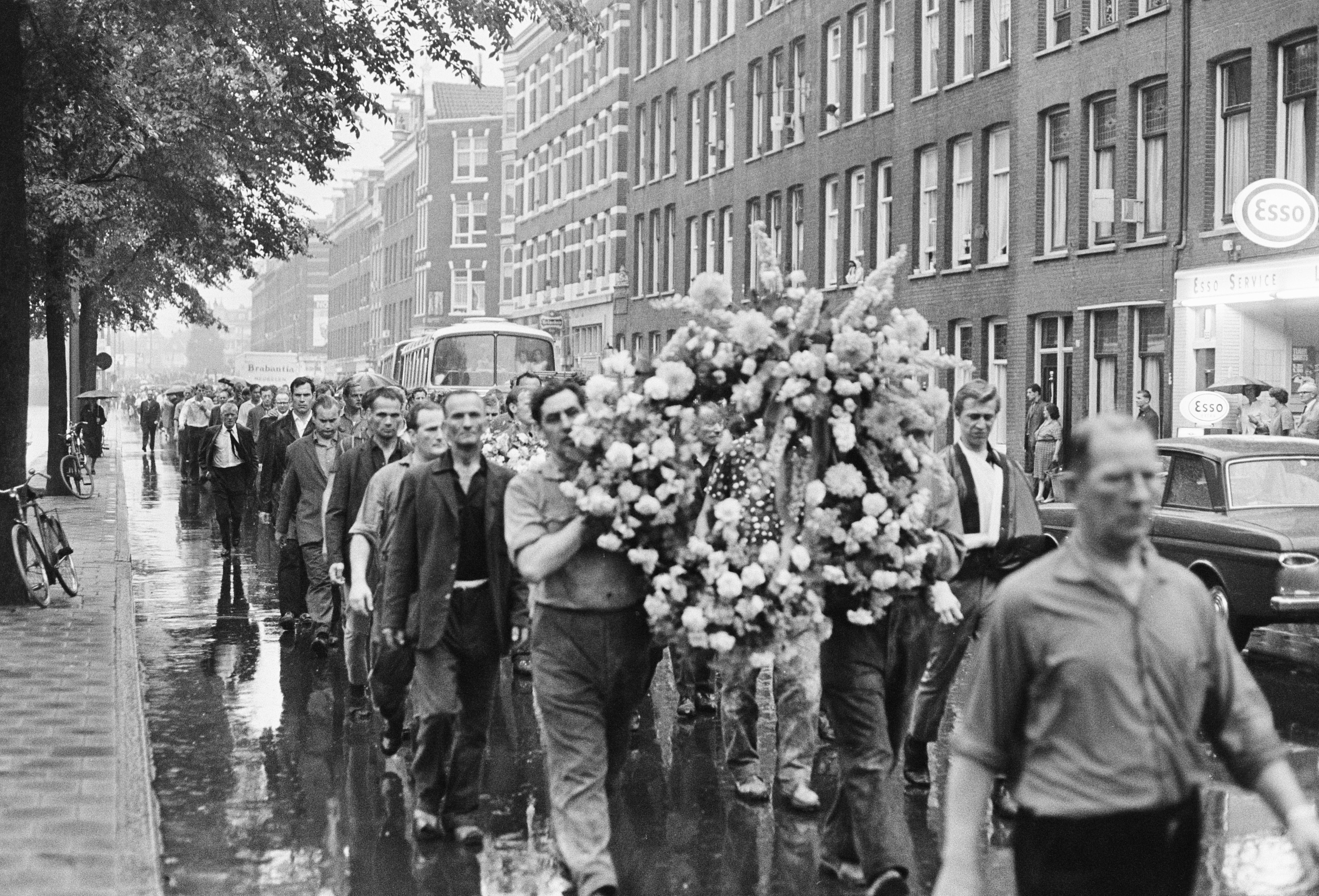 Bouwvakkers met kransen. De metselaar Jan Weggelaar overleed tijdens de z.g. Telegraafrellen aan een hartaanval op 13 juni 1966